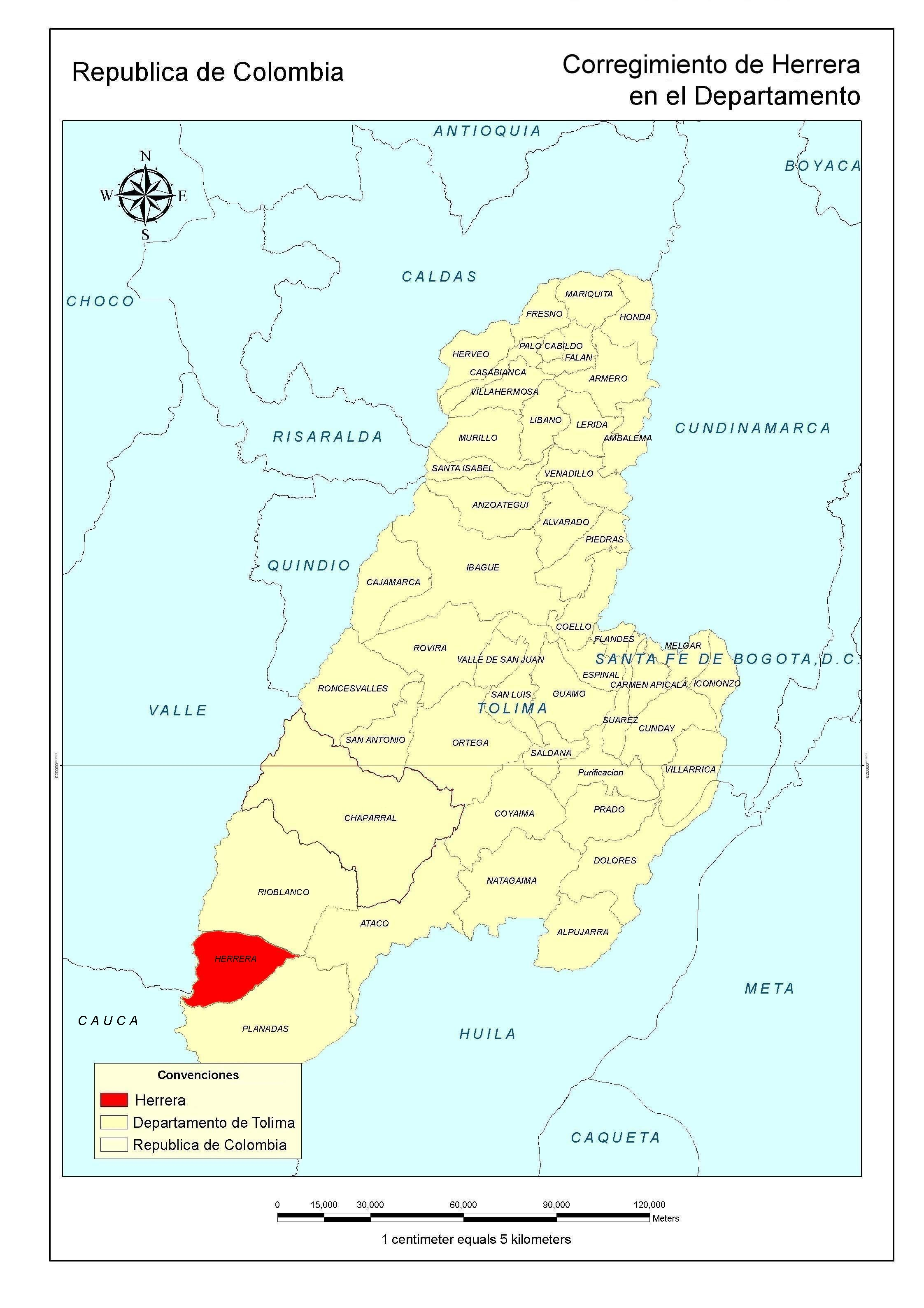 Corregimiento de Herrera en el Departamento del Tolima.